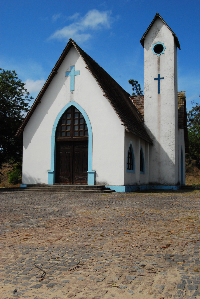 igrejinha de goiana, pernambuco